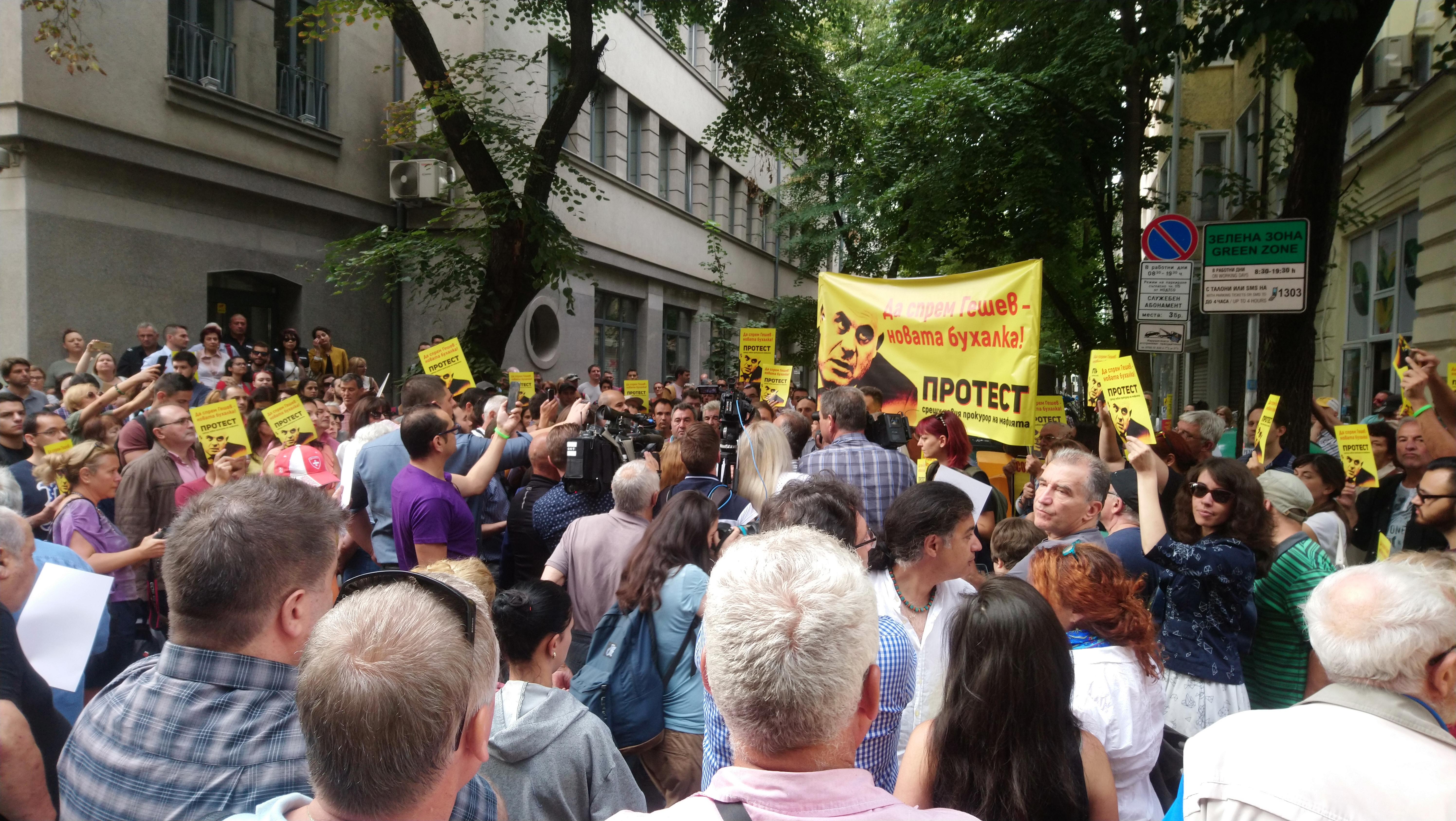 Протест срещу кандидатурата на Иван Гешев за главен прокурор на България, 25 юли 2019